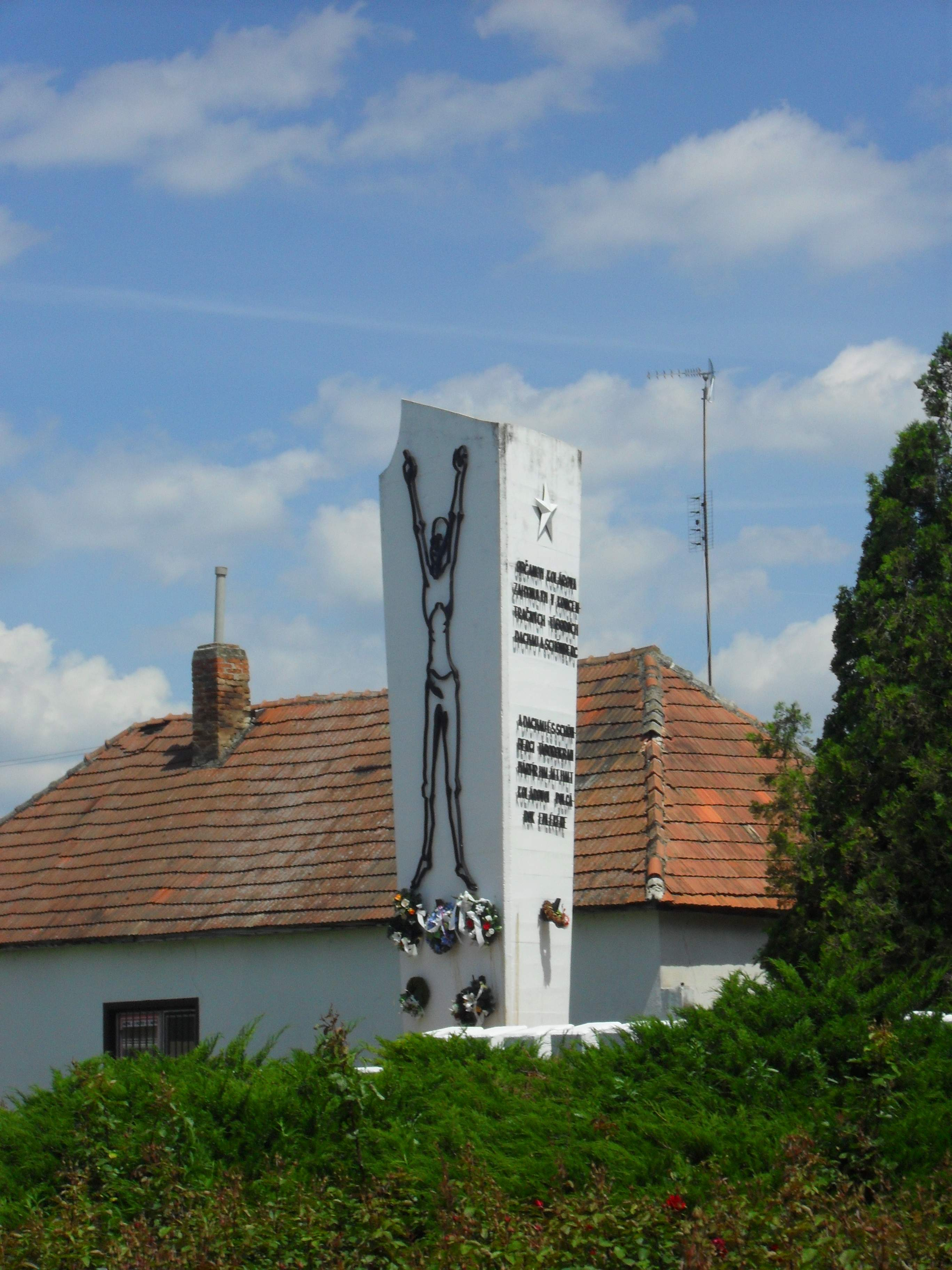 Gúta - a fasizmus áldozatainak emlékműve